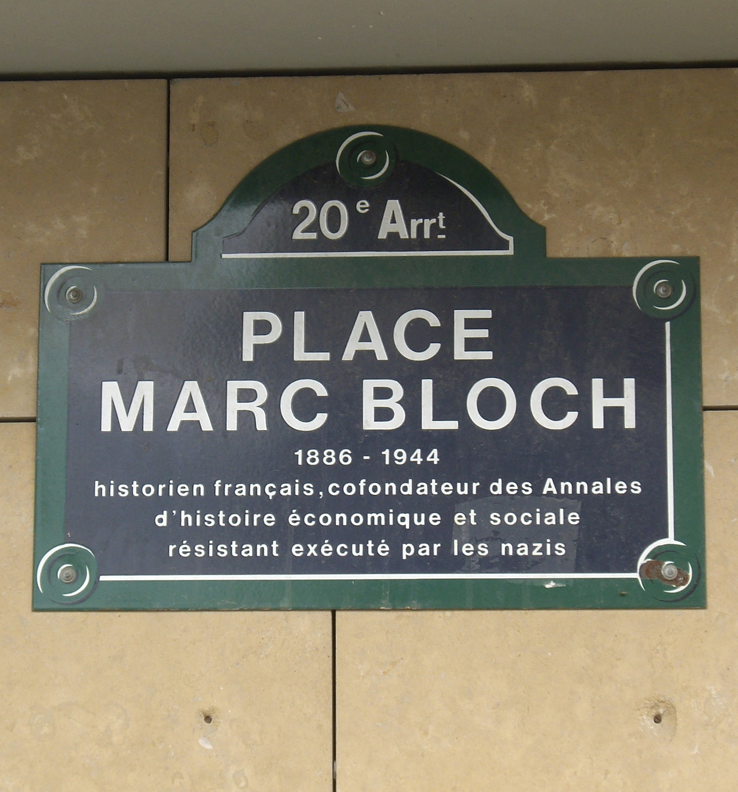 Place Marc-Bloch, Paris 20e. « Place Marc Bloch, 1886-1944, historien français, cofondateur des Annales d'histoire économique et sociale, résistant exécuté par les nazis. »